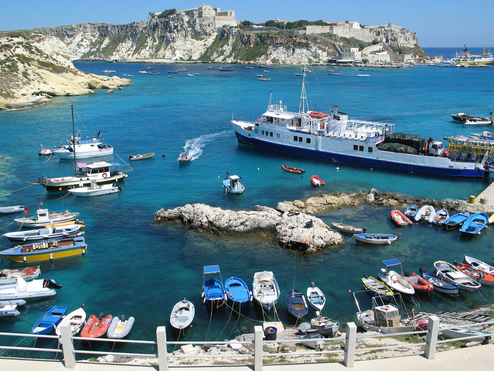 Isole Tremiti, Puglia, Italia